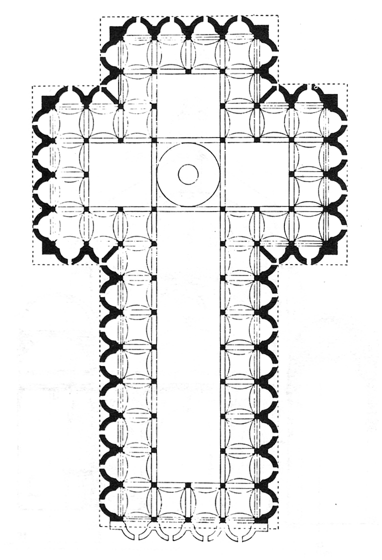 Pianta della chiesa di Santo Spirito, Opera del Brunelleschi